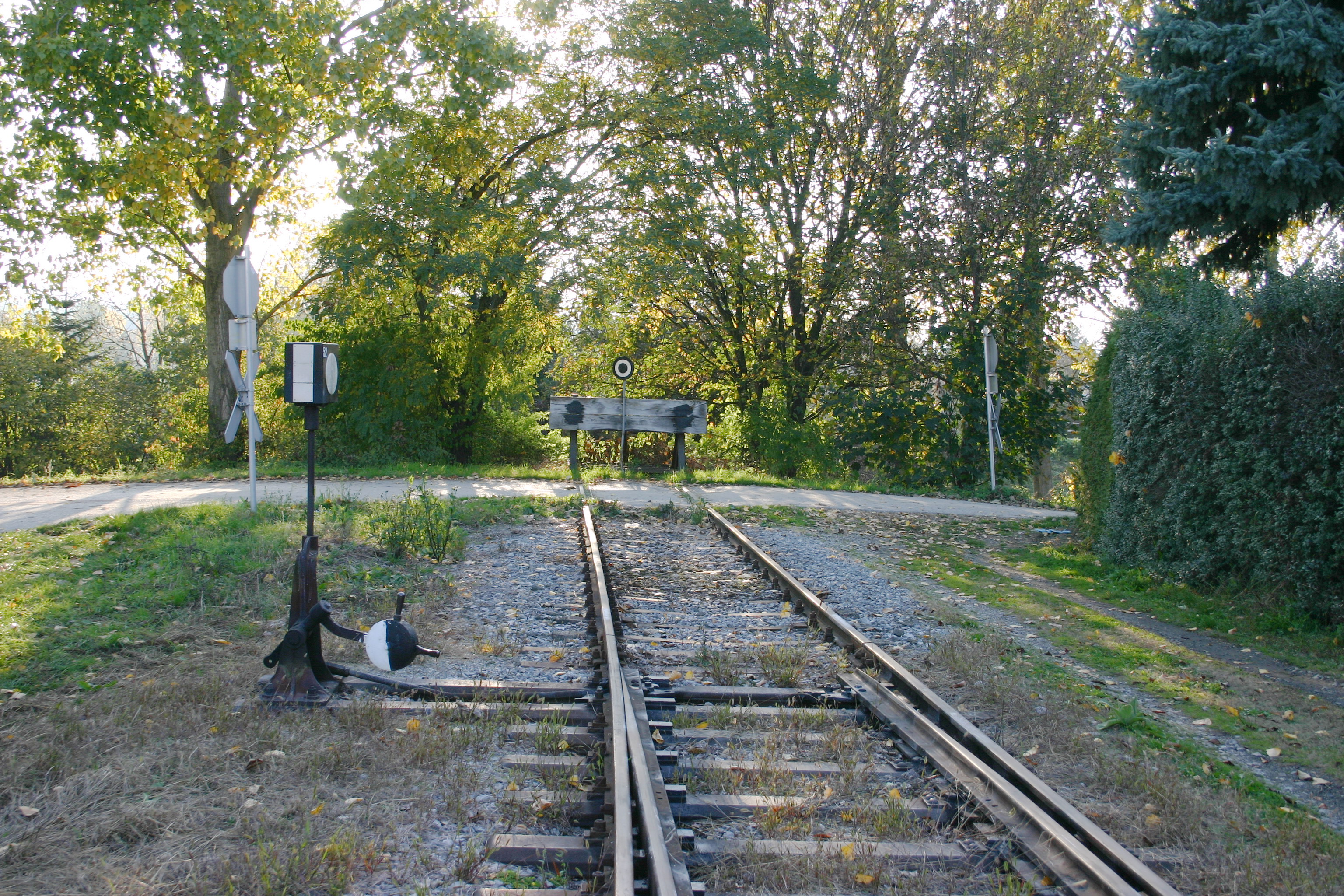 Oberloisdorf – Heutiges Streckenende der Burgenlandbahn